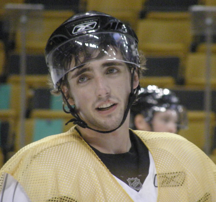 52 Zach Hamill (C)